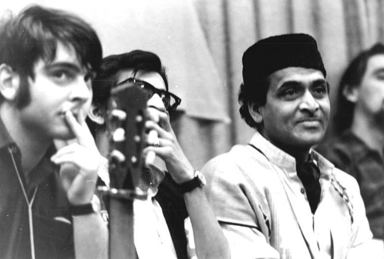 ADN-ZB-Katscherowski-16.8.72-rz-Berlin: 3. Festival des politischen Liedes. "Internationale Beobachter" bei einer Veranstaltung vor jungen Arbeiterinnen und Arbeitern des Berliner Großbetriebes Narva am 16.2.1972. Hartmut König (l.) und Dr. Bhupen Hazarika aus Indien (r.)